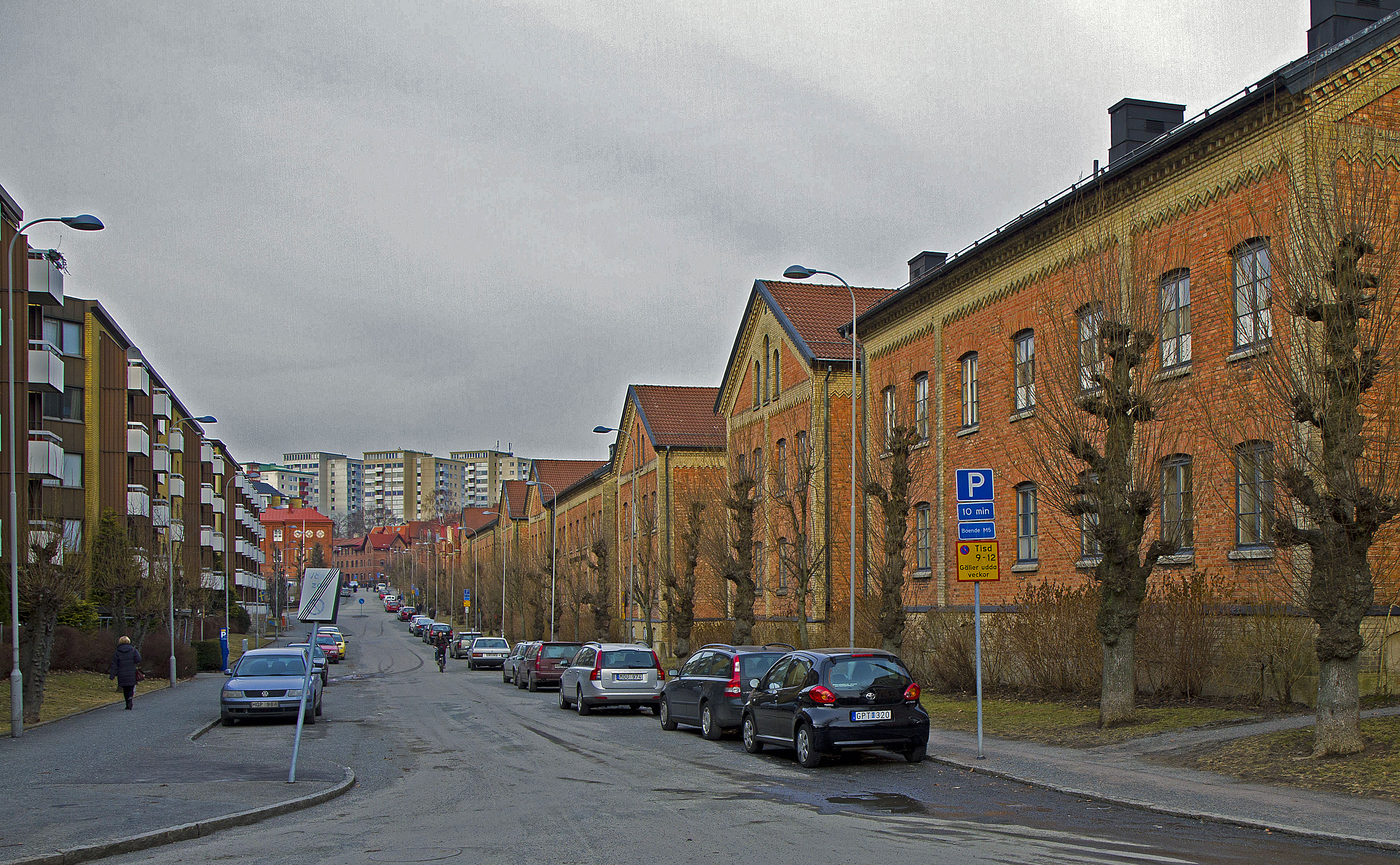 Carl Grimbergsgatan i Annedal, Göteborg, oktober 2010